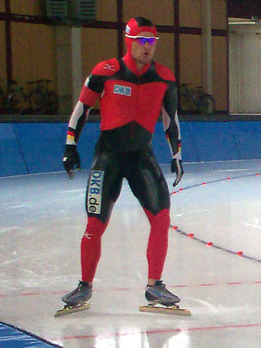 Überprüfungswettkampf (Berlin, Deutschland)